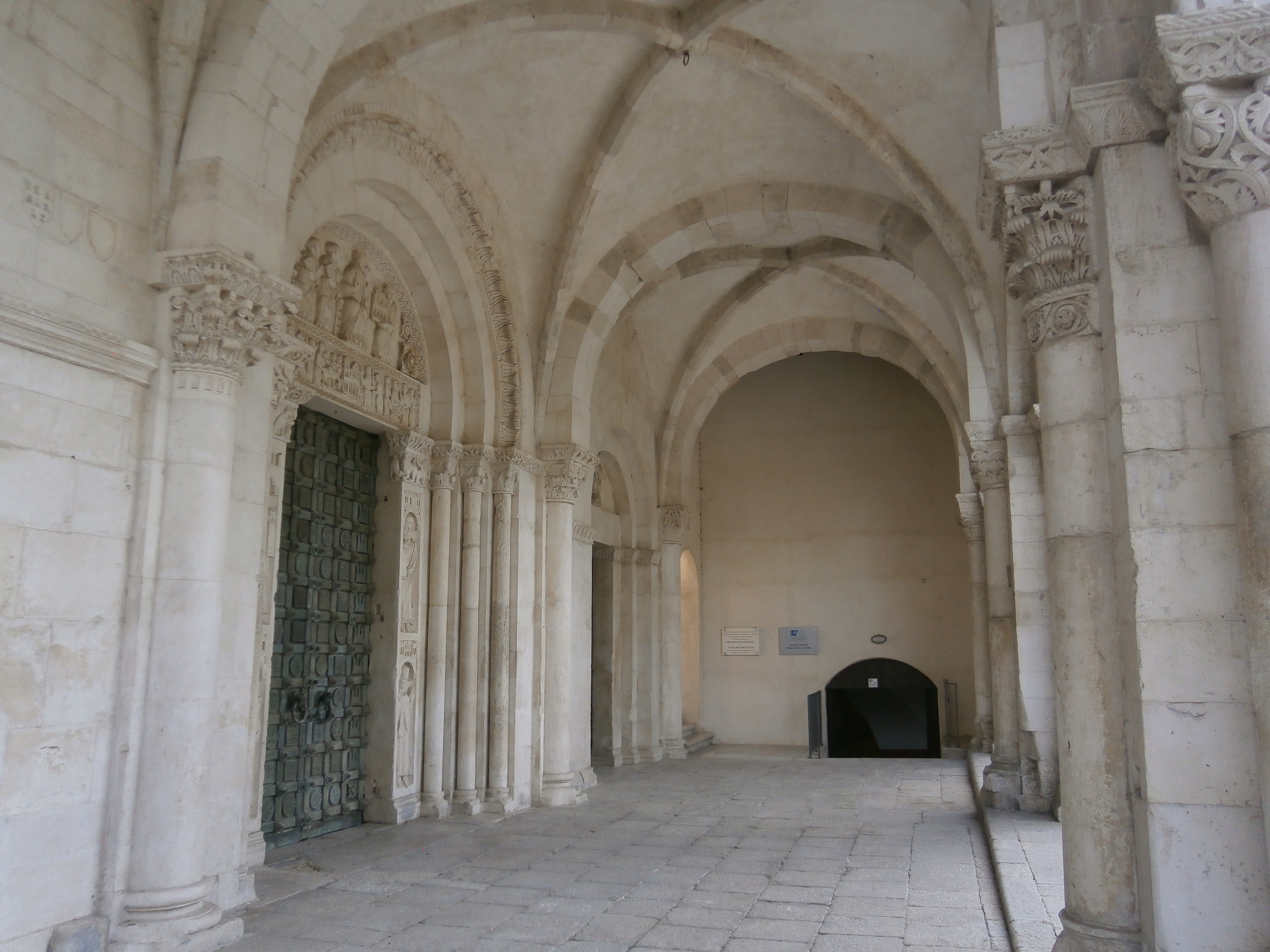 Abbazia di San Clemente a Casauria - il portico